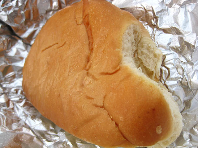 Jamaican coco bread